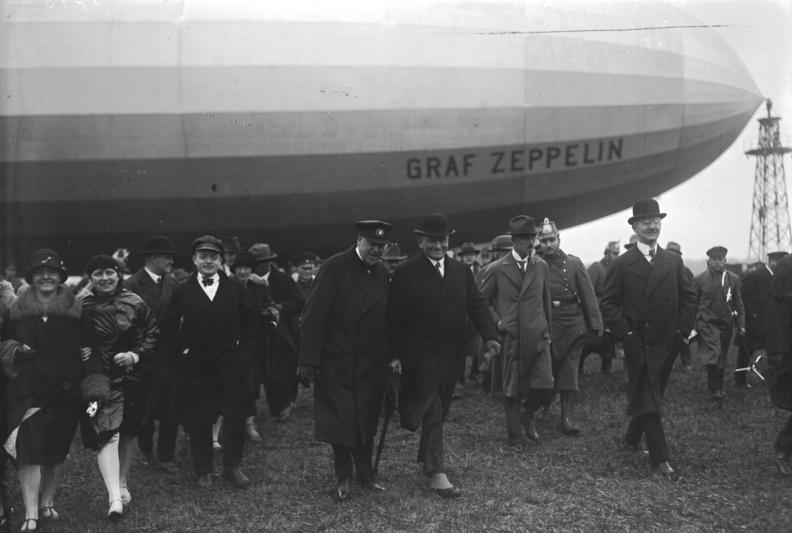 Der jubelnde Empfang des Luftschiffes "Graf Zeppelin" in der Reichshauptstadt Berlin! Der Führer des Luftschiffes "Graf Zeppelin" Dr. Hugo Eckener begibt sich nach der glücklichen Landung des Luftschiffes zum Empfang. Neben Dr. Eckener Ministerialdirektor Brandenburg, Dr. Dürr, der Erbauer und Construkteur des glückhaften Luftschiffes sowie der deutsche Reichsbankpräsident Dr. Schacht.